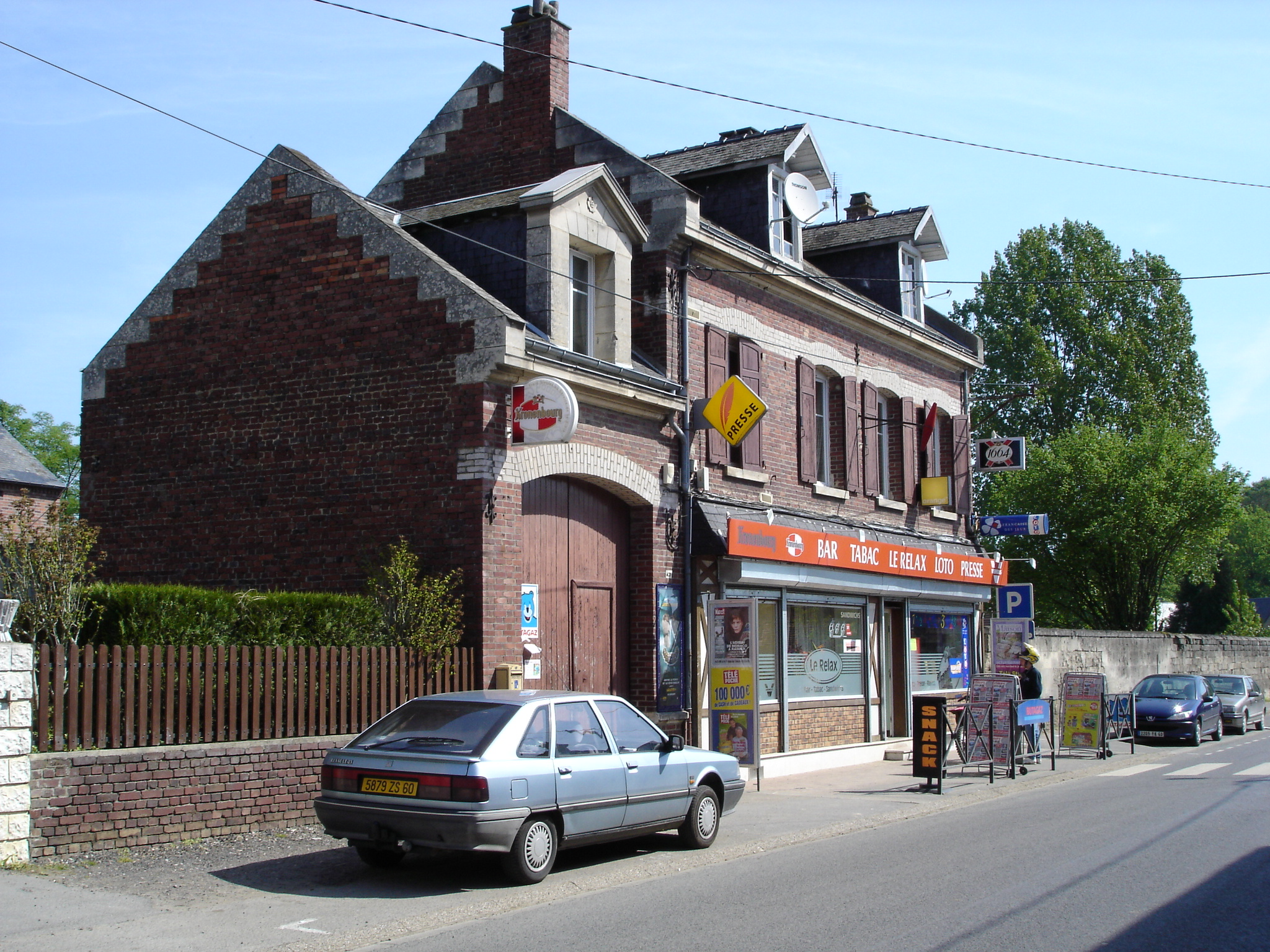 Bar-tabac Le Relax à Carlepont - Photo amateur prise par moi-même